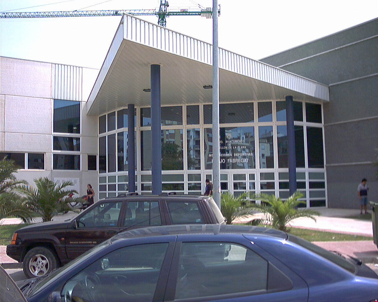 Entrada de la piscina municipal Emilio Fabregat en el Grao de Castellón, año 2005